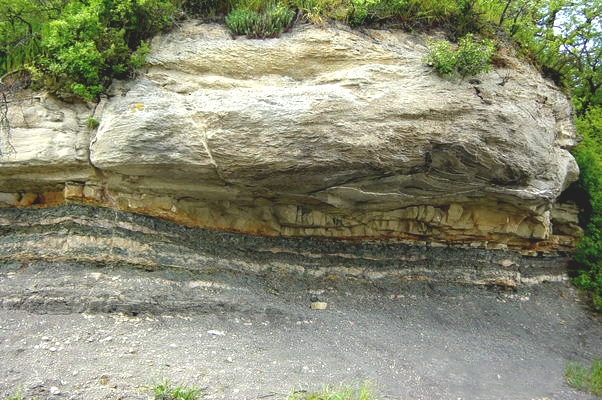 Geologischer Aufschluss oberhalb der südlichen Weinhänge am Schwanberg bei Iphofen. Zu sehen ist die Schichtsgrenze zwischen Estherienschichten (Liegendes) und Schilfsandstein (Hangendes)